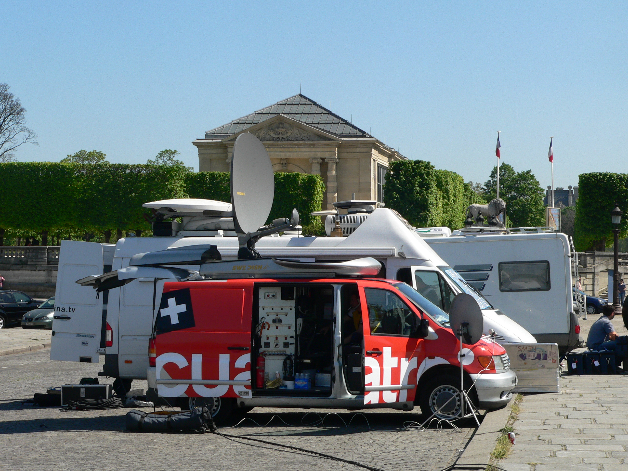 Un camion de Cuatro TV, une chaîne privée espagnole, sur la Place de la Concorde à Paris, sans doute pour couvrir les élections